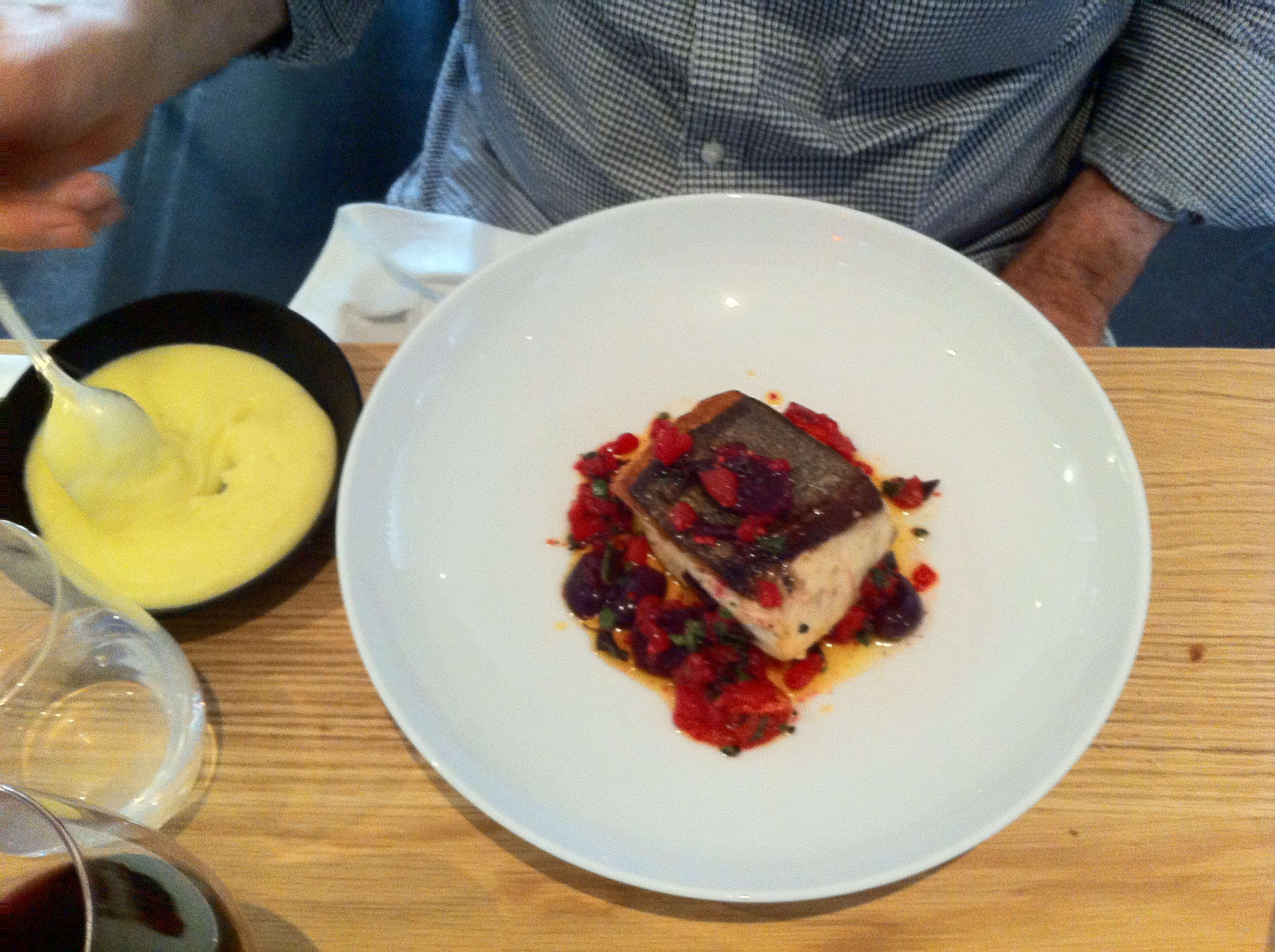 Greater Umberjack baked with olive oil in Raphael restaurant